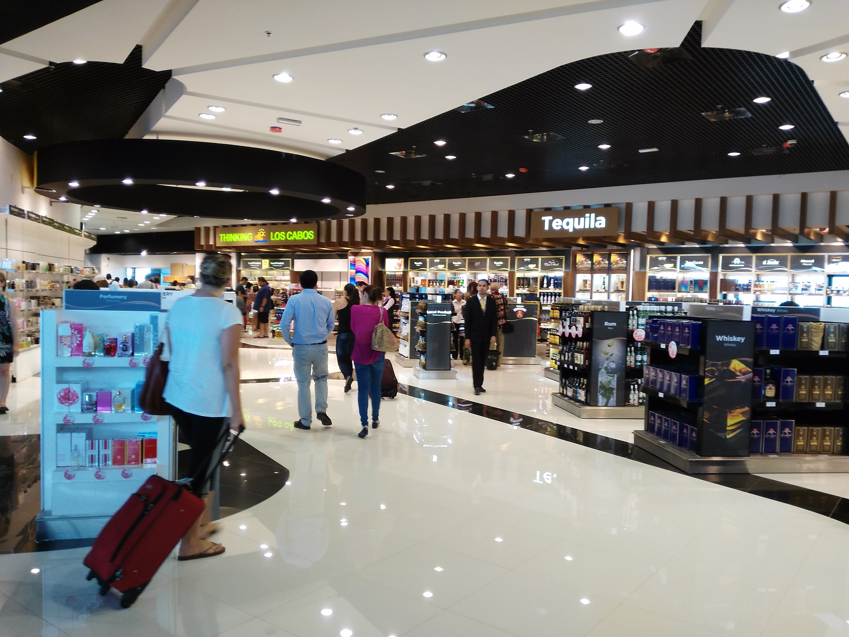 Aeropuerto de Los Cabos